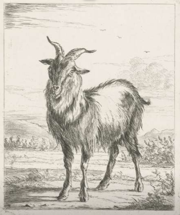 Staande Geit, nach Pieter Gaal